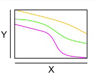 Injektivität Mengenkasten